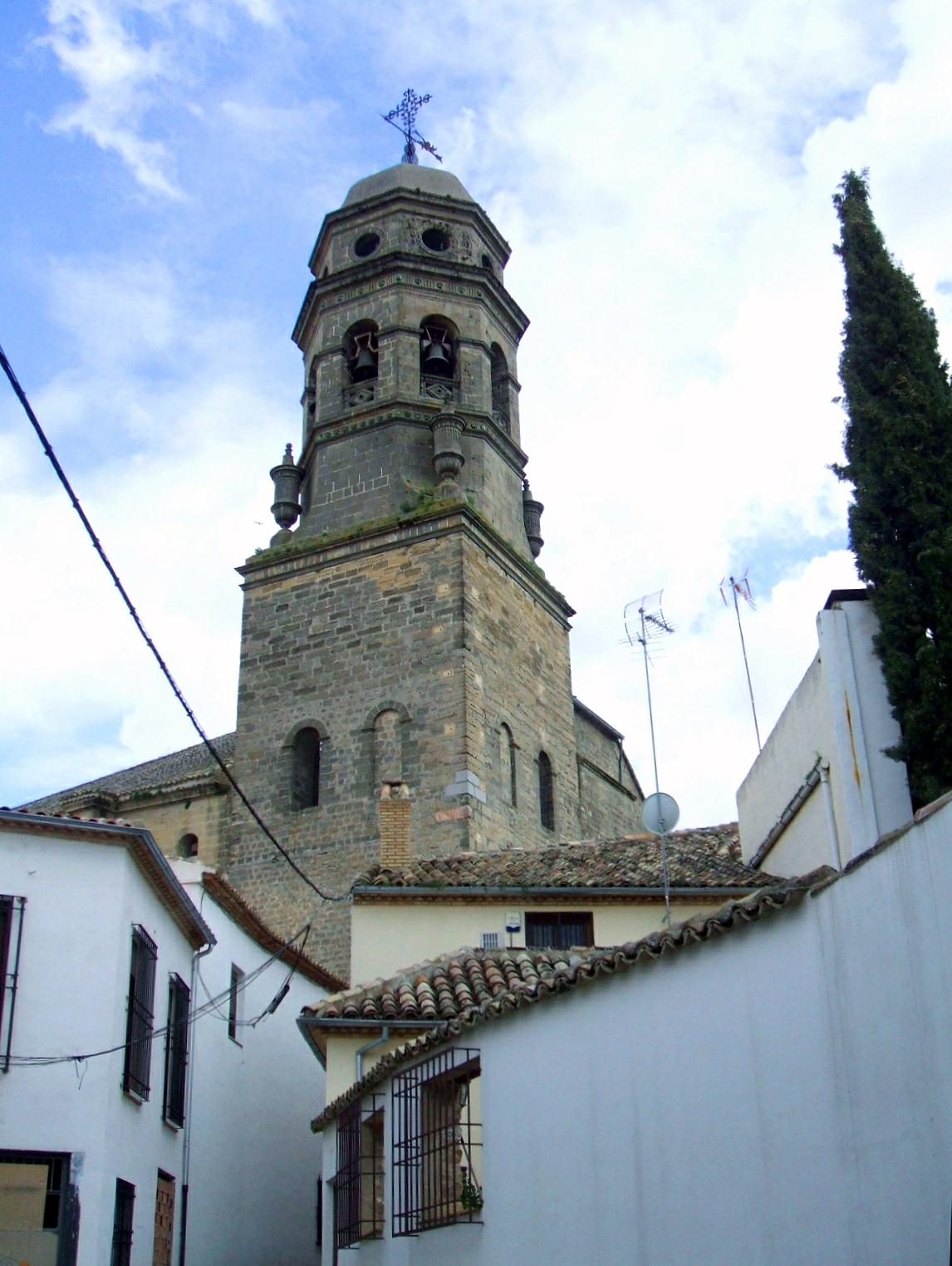 Torre de la Catedral de Baeza (Jaén, Andalucía, España)